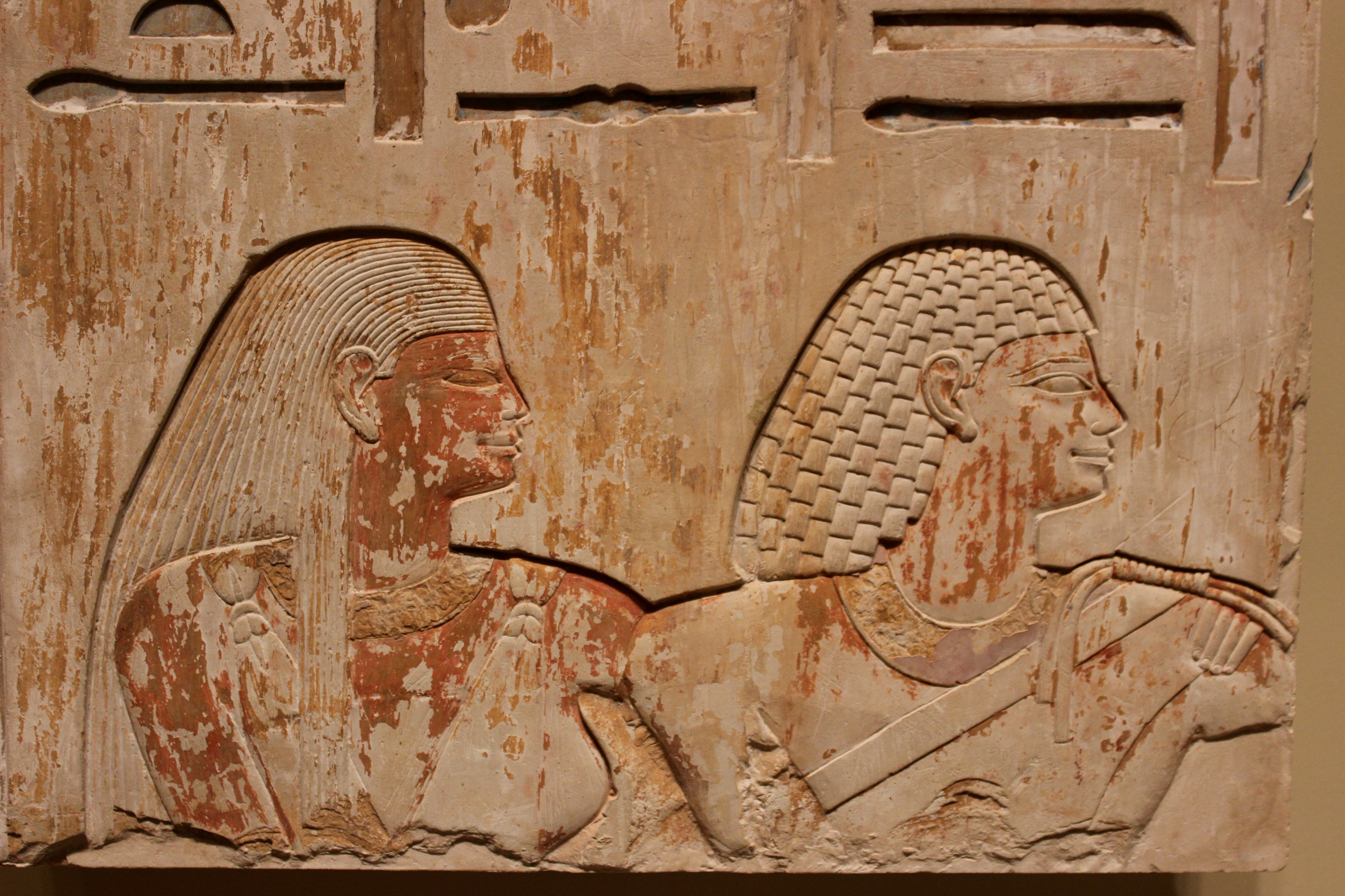 Seattle Art Museum. Relieve de Montuemhat.